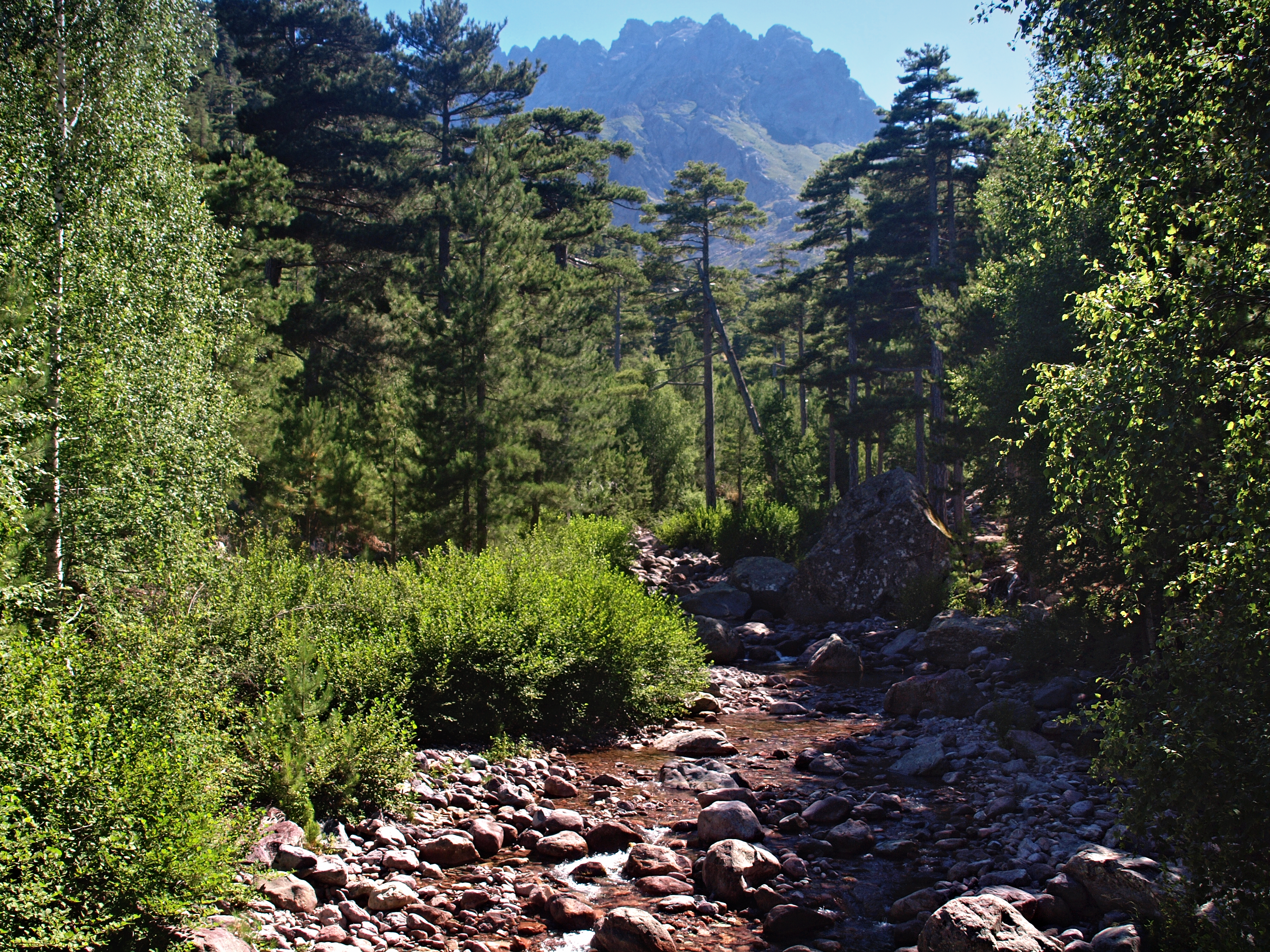 Asco (Corsica) - Ruisseau de Stranciacone dans la forêt communale d'Ascu